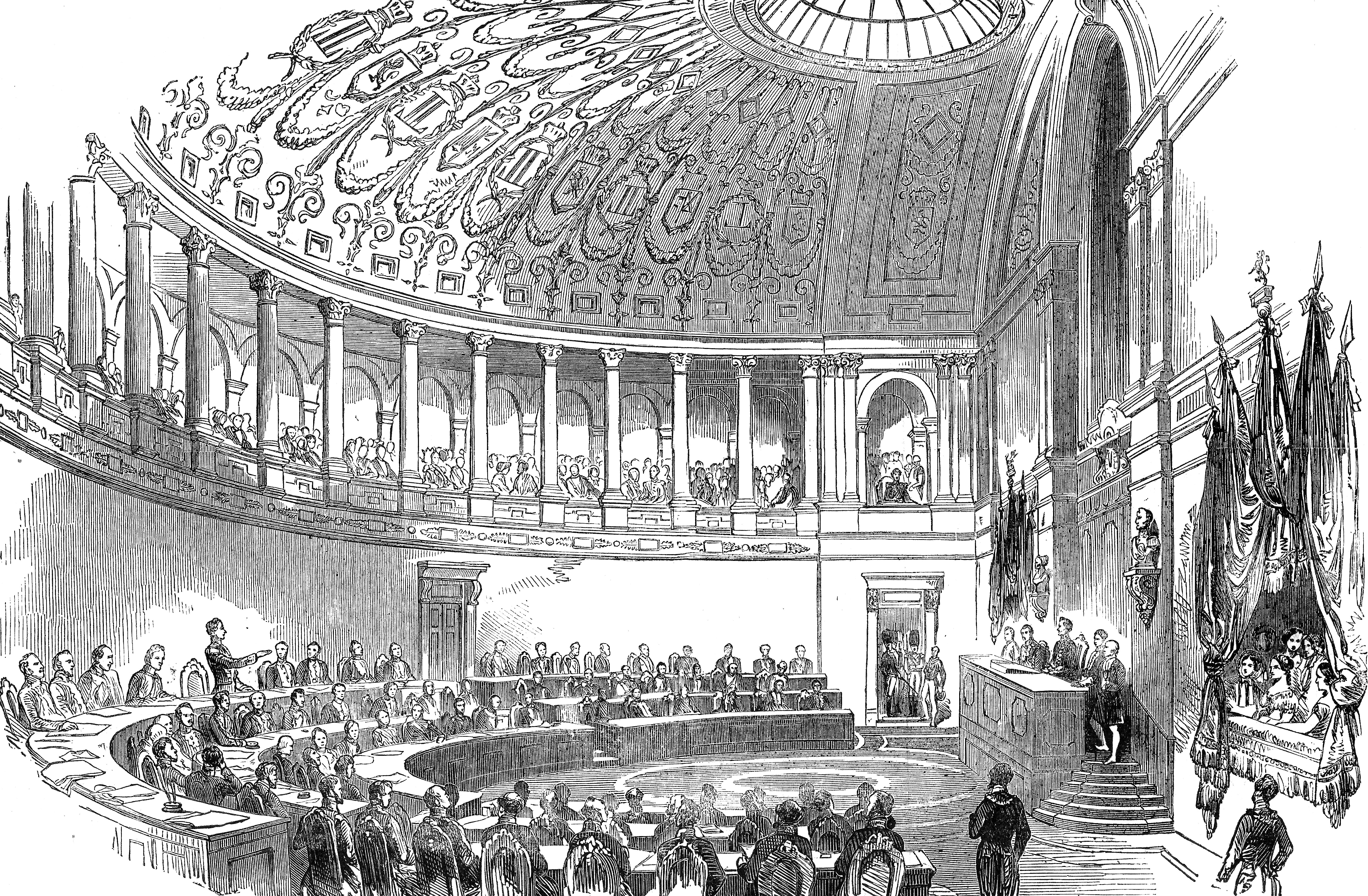 Prestation de serment du futur roi Léopold II de Belgique comme sénateur, Palais de la Nation (Bruxelles), le 9 avril 1853. — En vertu de l’article 58 de la Constitution, à l’âge de 18 ans, l’héritier présomptif du roi est de droit sénateur. Il n’a voix délibérative qu’à l’âge de 25 ans.